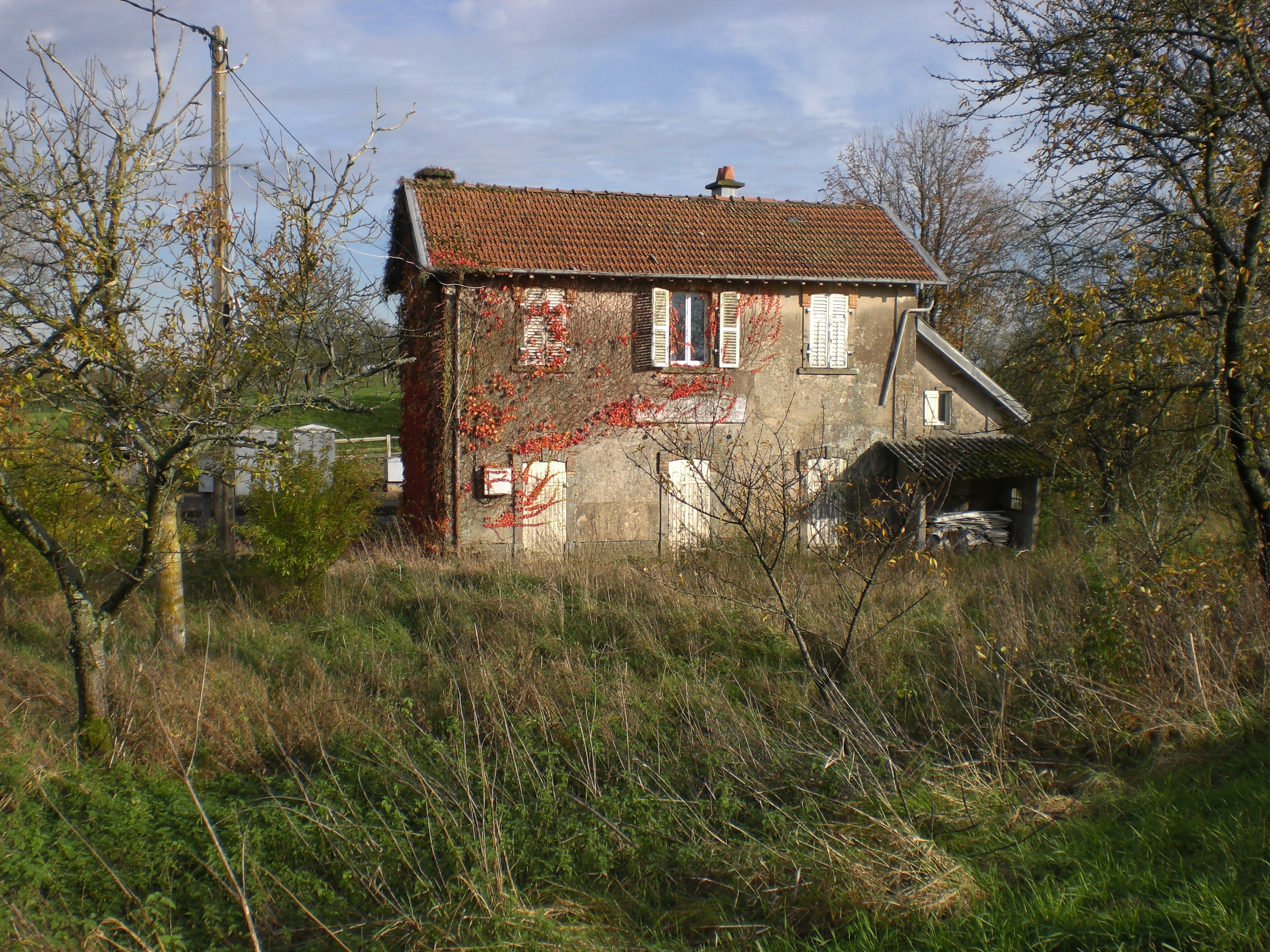 Bahnhof Bouzanville-Boulaincourt, Gartenseite